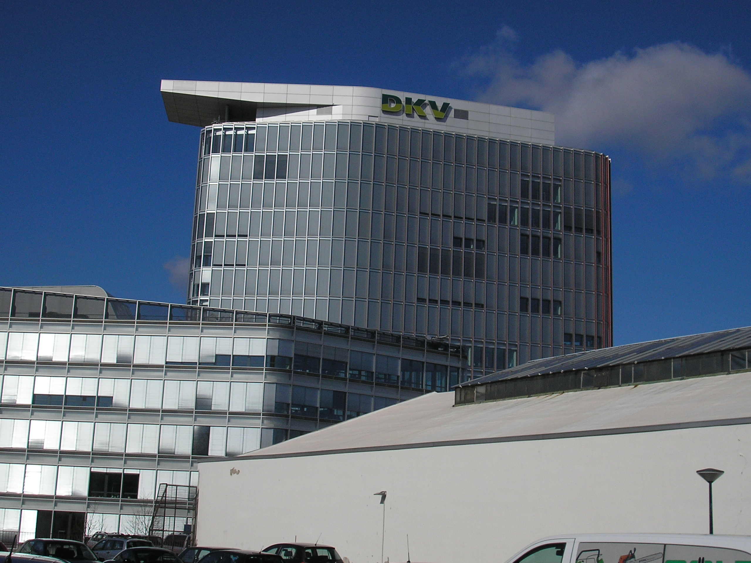 Bürogebäude der DKV-Verwaltung in Köln-Braunsfeld